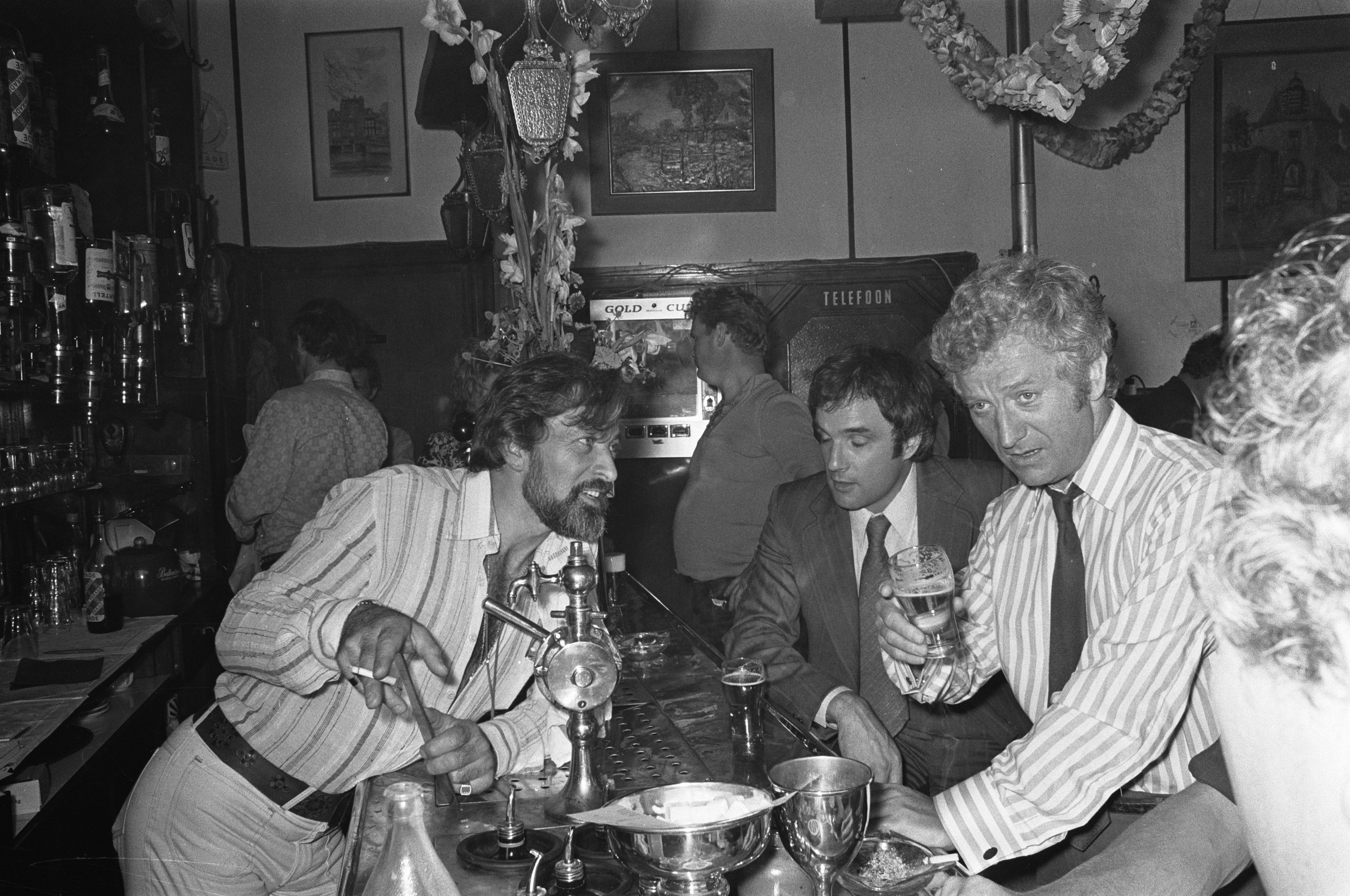 Collectie / Archief : Fotocollectie Anefo Reportage / Serie : [ onbekend ] Beschrijving : Opnamen voor Engelse TV-serie Comm. van der Valk in cafe Joop Heuvel te Amsterdam, v.l.n.r. Walter Brown , Michael Lattimer en Barry Foster Datum : 8 augustus 1972 Locatie : Amsterdam, Noord-Holland Trefwoorden : OPNAMEN, TV-series, cafes Persoonsnaam : Comm. van der Valk, Joop Heuvel, Michael Latimer Fotograaf : Punt, […] / Anefo Auteursrechthebbende : Nationaal Archief Materiaalsoort : Negatief (zwart/wit) Nummer archiefinventaris : bekijk toegang 2.24.01.05 Bestanddeelnummer : 925-7950